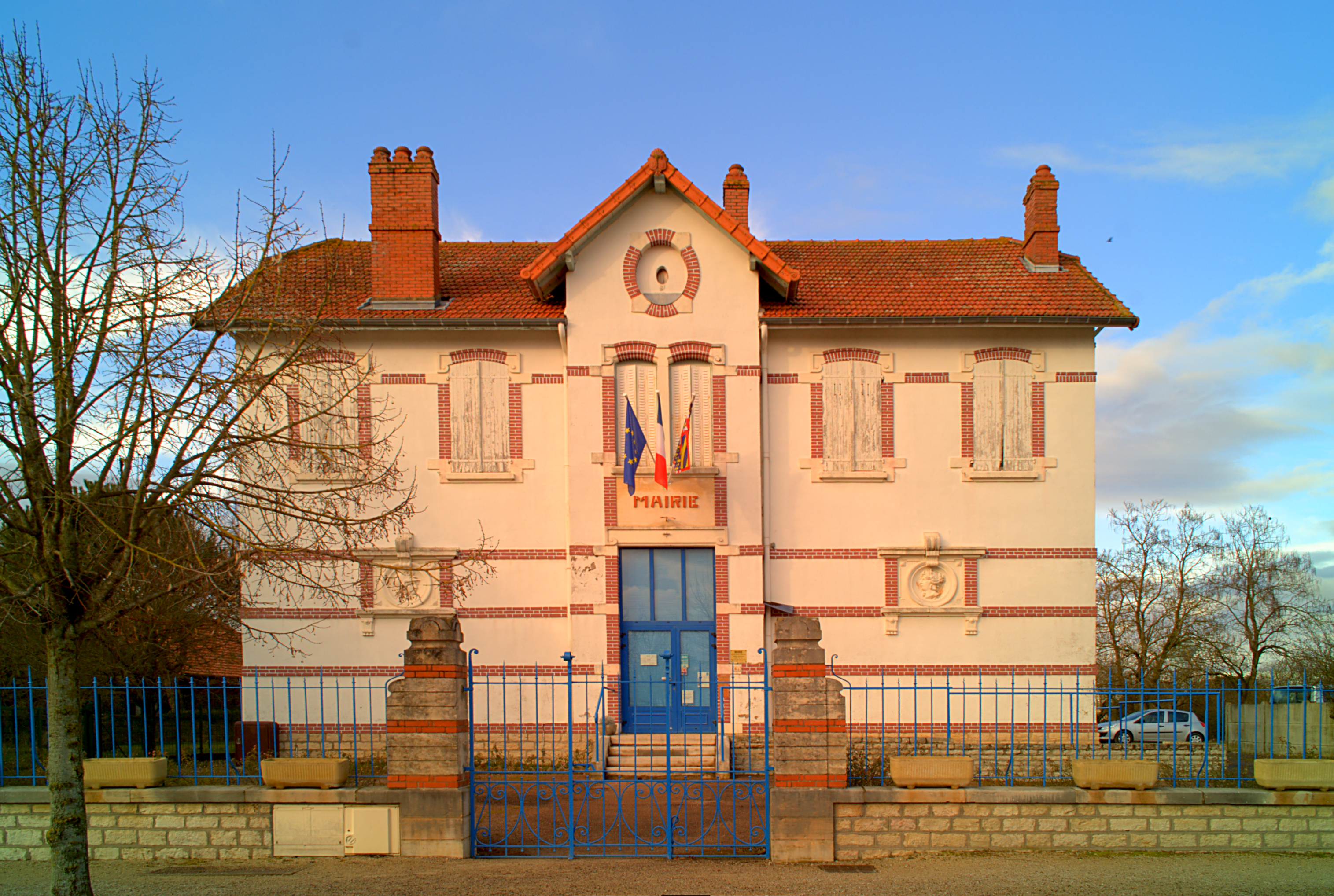 Mairie, Allerey-sur-Saône (Saône-et-Loire, Bourgogne, France)